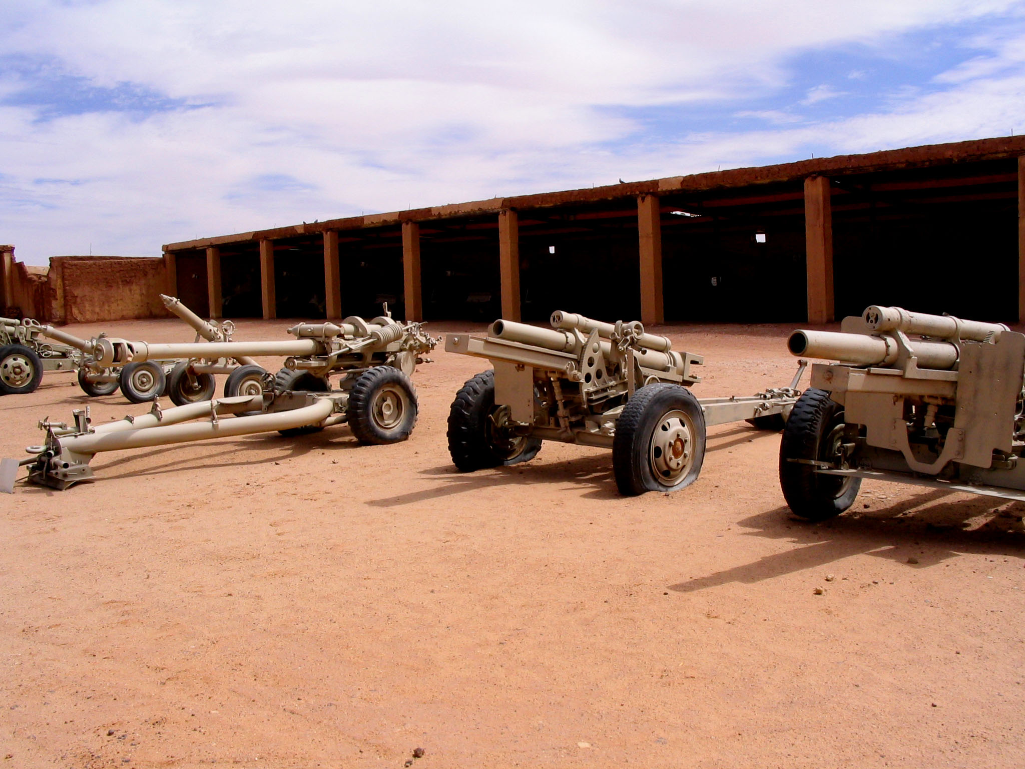 Musee de l'Armee de Liberation Popular sahraouie à Rabouni, centre administratif du gouvernement de la RASD